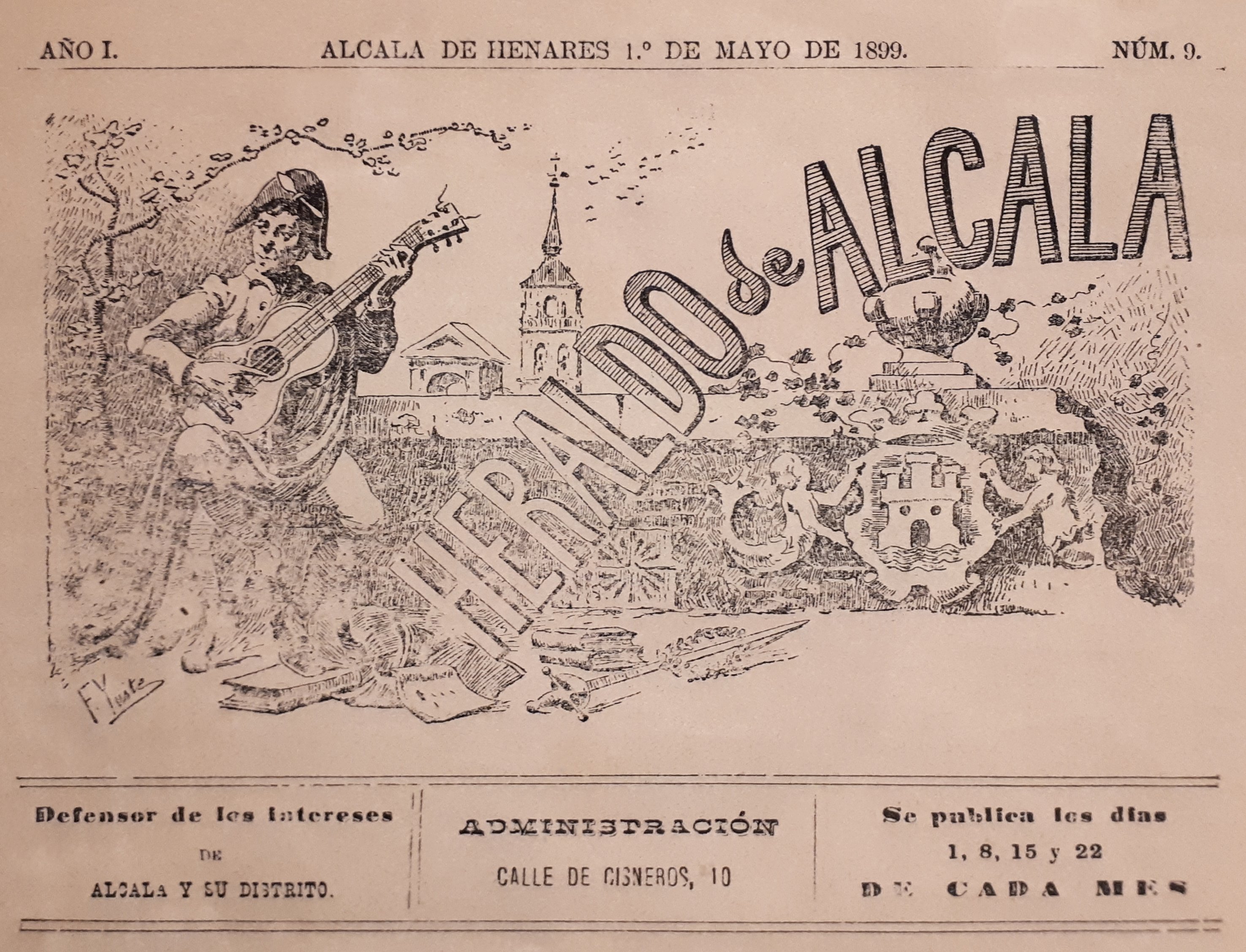 Cabecera del semanario "Heraldo de Alcalá" publicada el 1 de mayo de 1899 en Alcalá de Henares (Comunidad de Madrid - España). Diseñada por Félix Yuste. De izquierda a derecha representa: a un estudiante tocando la guitarra, con libros y una espada en el suelo, la Puerta de Madrid, el campanario del la Catedral-Magistral y el Escudo de Alcalá de Henares. Director: Francisco Huerta Calopa. Sede: Calle de Cisneros, nº 10. Impreso por: Federico García Carballo.